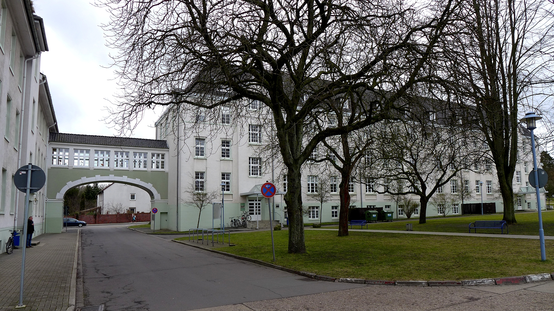 Soltau, Winsener Straße: Unternehmen und Behörden in den Gebäuden der ehemaligen Kaserne der britischen Streitkräfte.